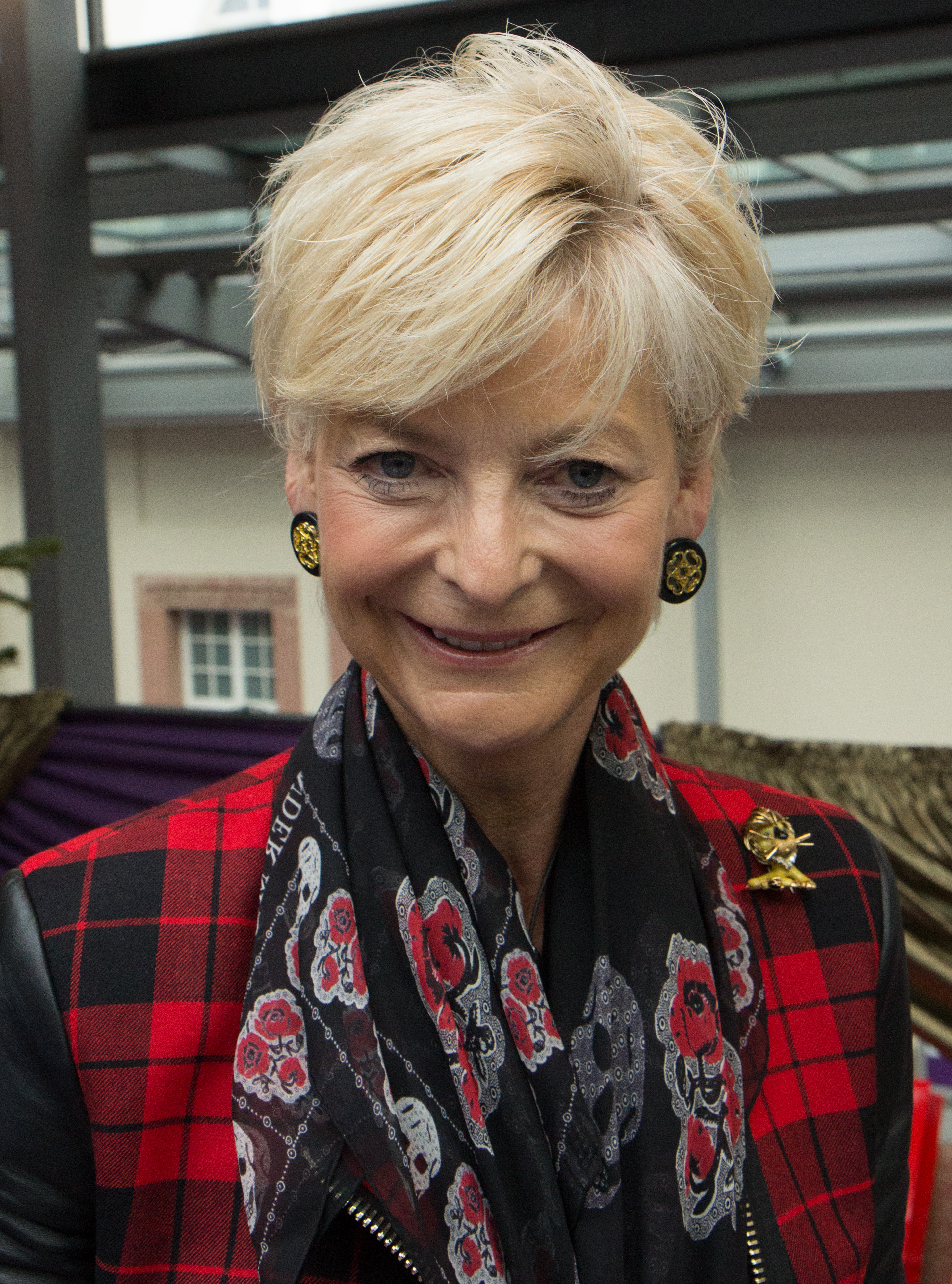 Internationales Festhallen Reitturnier 2017 in Frankfurt. Ann Kathrin Linsenhoff